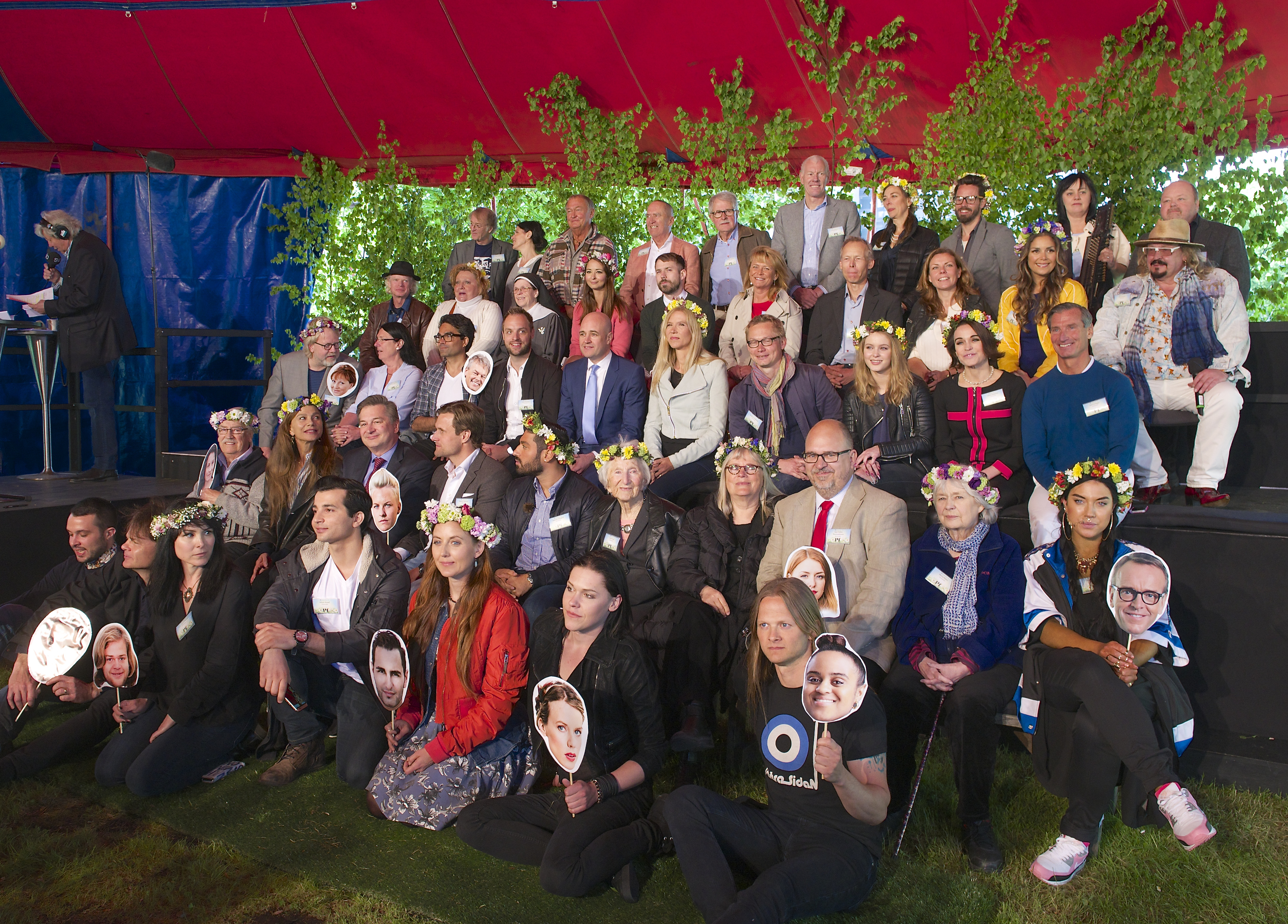 Sommarpratarna i P1 på presskonferensen i Radiohusets trädgård den 3 juni 2015.